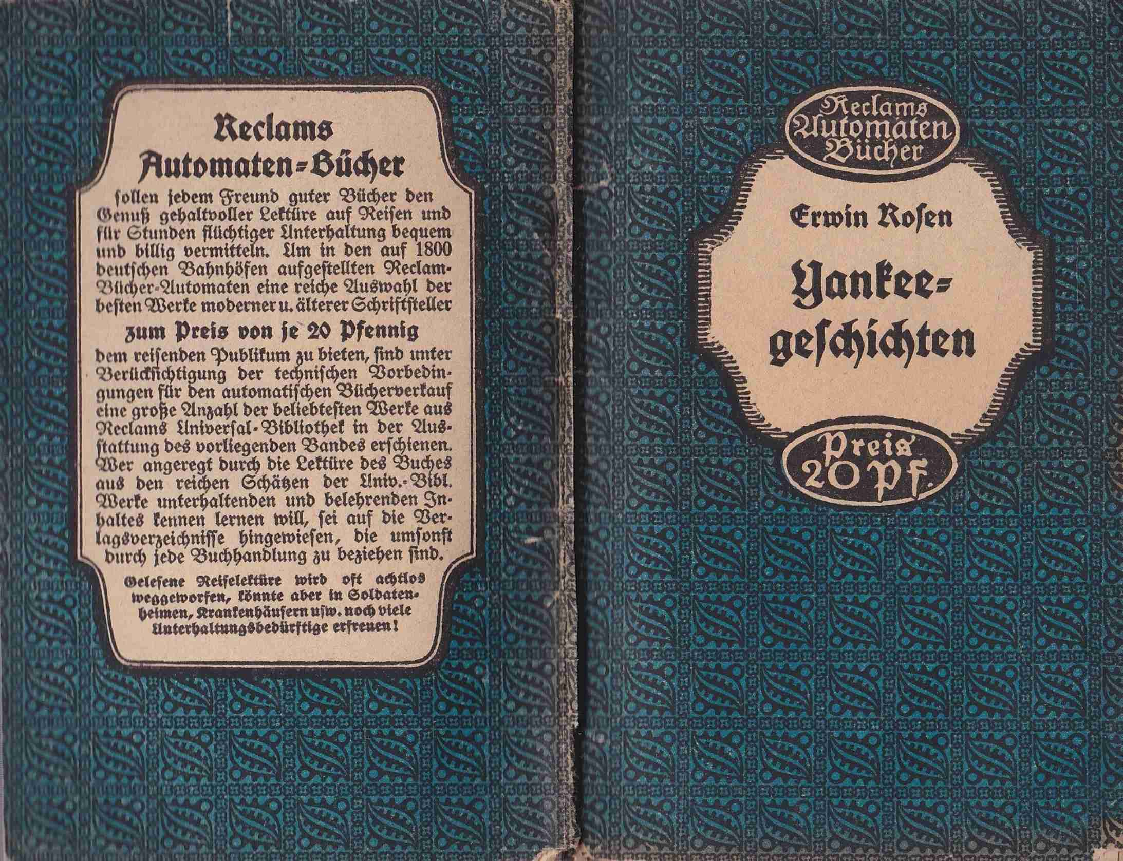 Titelblatt von Erwin Rosen: Yankeegeschichten. Reclams Automaten Bücher, Leipzig : Reclam, um 1920.